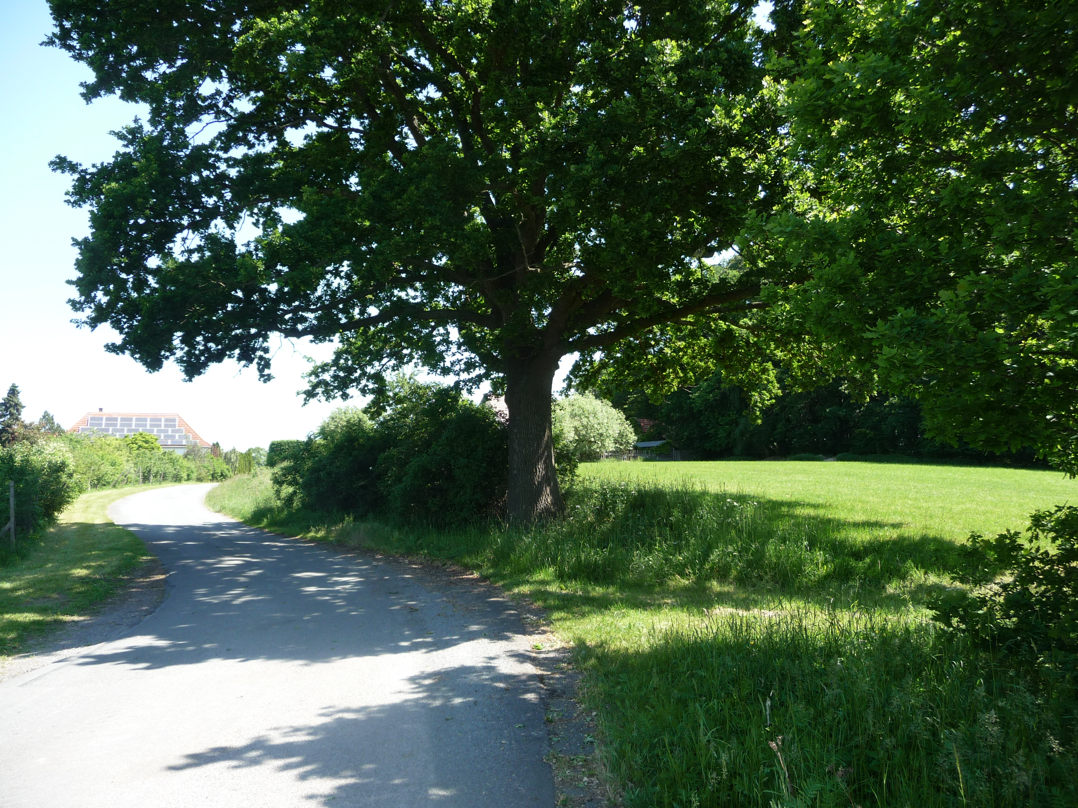 Ein Waldstück im Meller Ortsteil Riemsloh, durch welches sich die Krukumer Straße zieht.